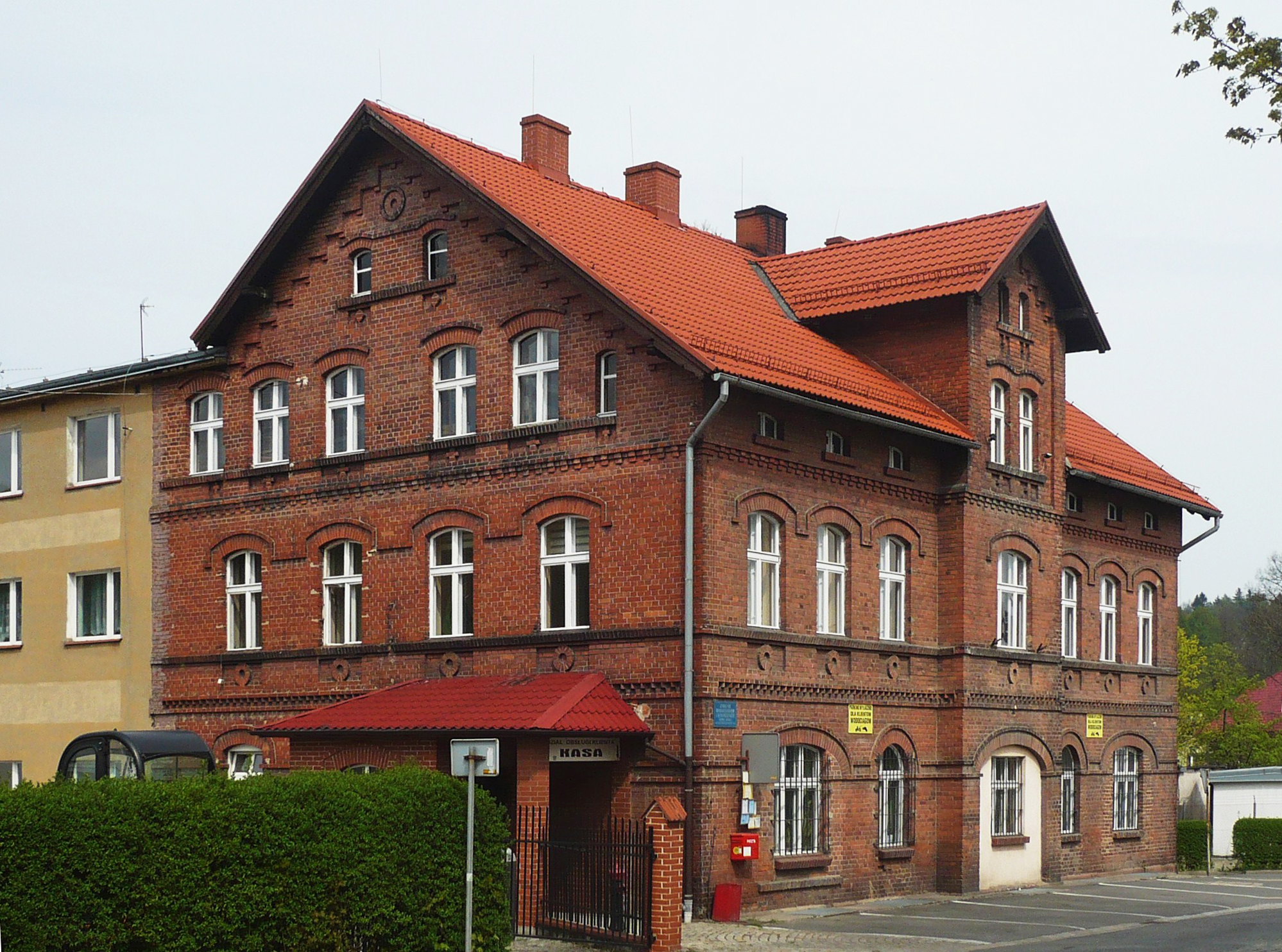 Nowa Ruda. ZWiK